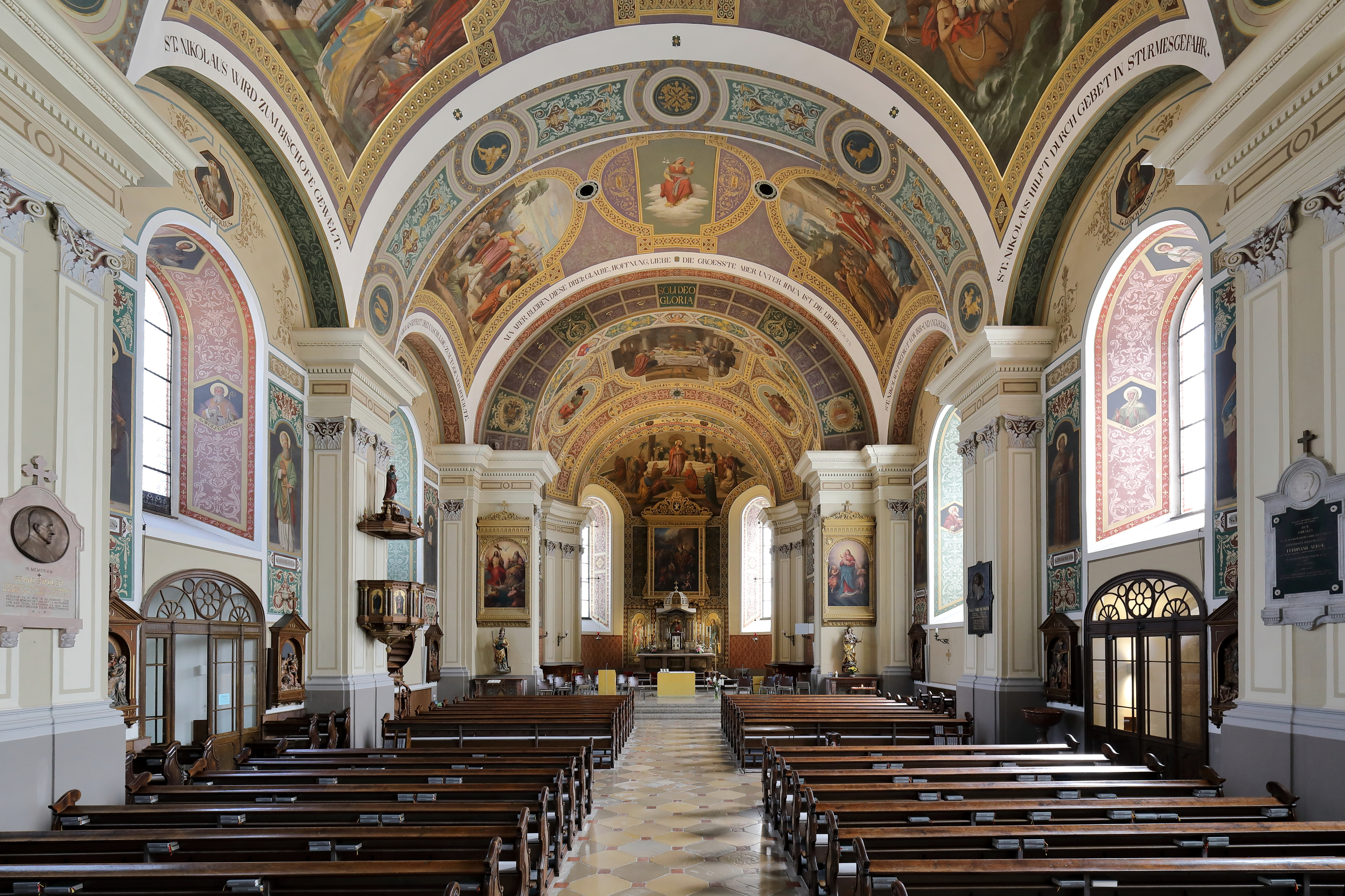 Innenansicht der röm.-kath. Stadtpfarrkirche hl. Nikolaus in der oberösterreichischen Stadtgemeinde Bad Ischl in Richtung Hochaltar.Die Kirche wurde bis auf den Kirchturm anstelle einer Vorgängerkirche zwischen 1771 und 1780 errichtet. Die Fresken schuf der Kirchenmaler Georg Mader im Zuge einer großen Renovierung und Umgestaltung des Kircheninneren zwischen 1874 und 1880.